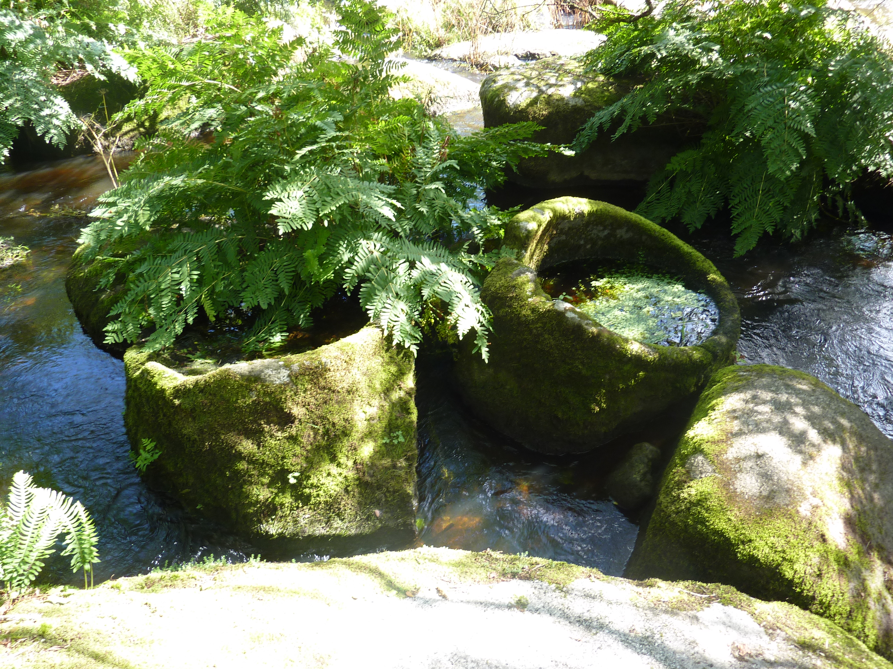 Ellez (limite Brennilis-Loqueffret): gué de Mardoul, cavités et rigole à usage sacrificiel, traces d'une religion pré-chrétienne